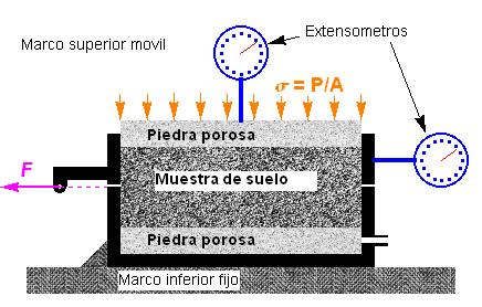 Esquema del aparato de resistencia al esfuerzo cortante directo